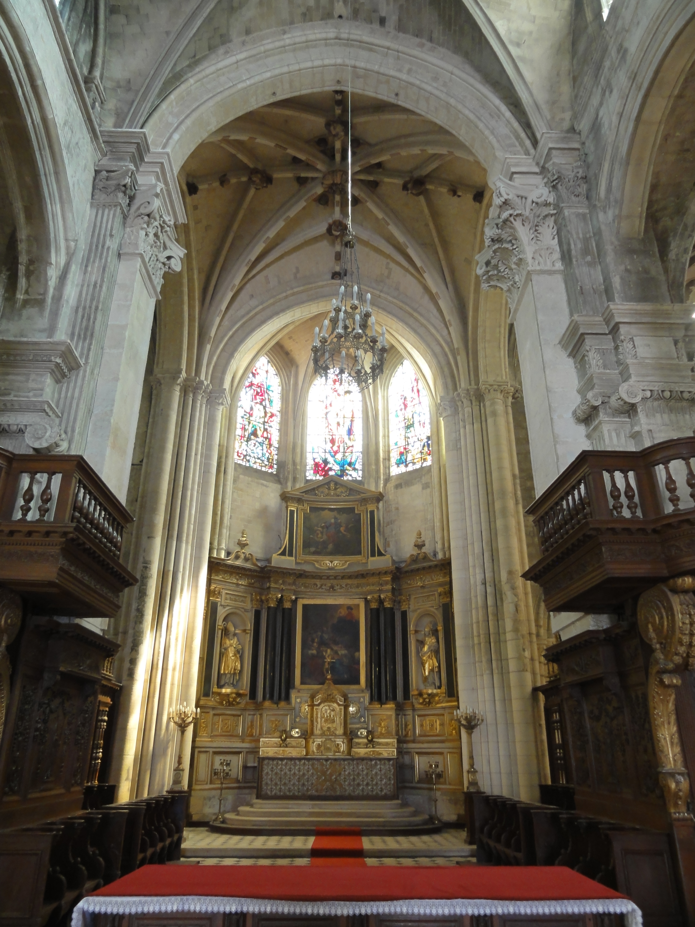 Vue dans le choeur depuis la croisée du transept.